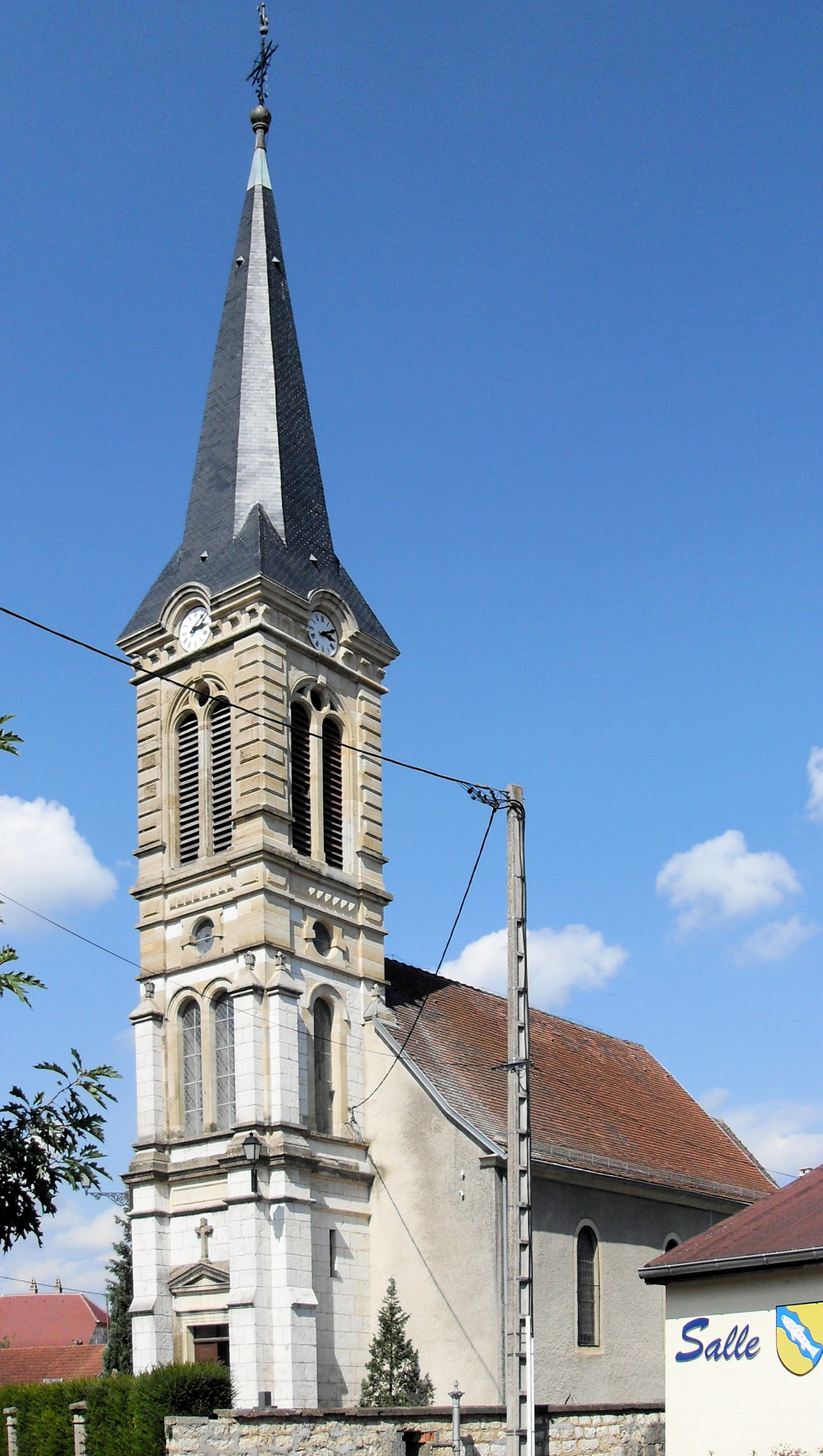 L'église Saint-Léger à Fislis